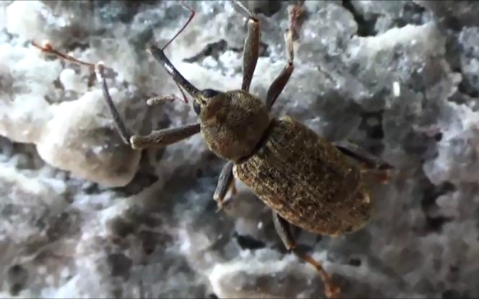 "Dorytomus sp"